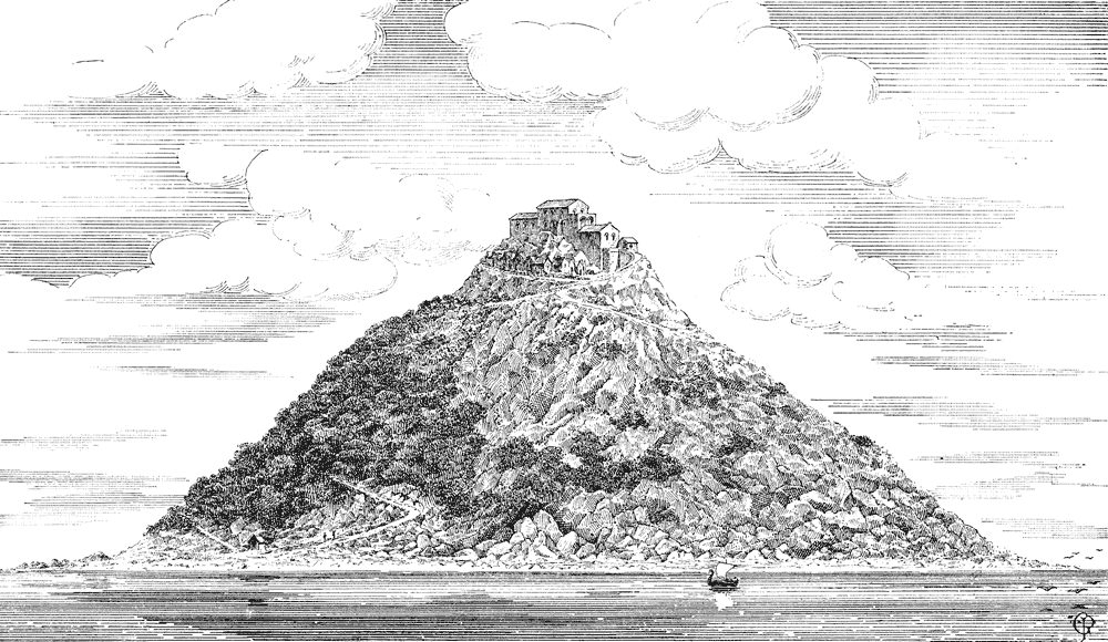 Restitution d'après les vestiges des monuments et les textes anciens, gravure de P. Gout, architecte en chef des Monuments Historiques, 1910. L'église actuelle s'élève à la place de l'édifice à deux niveaux au sommet. Le pignon à deux arches à droite est celui de l'église préromane, actuellement Notre-Dame-sous-terre. On aperçoit la fontaine de Saint-Aubert en bas, à gauche. Provient de l'édition anastaltique de "Le Mont Saint-Michel" de Paul Gout (1910); ne comporte pas de copyright. Paul Gout (1852-1923)